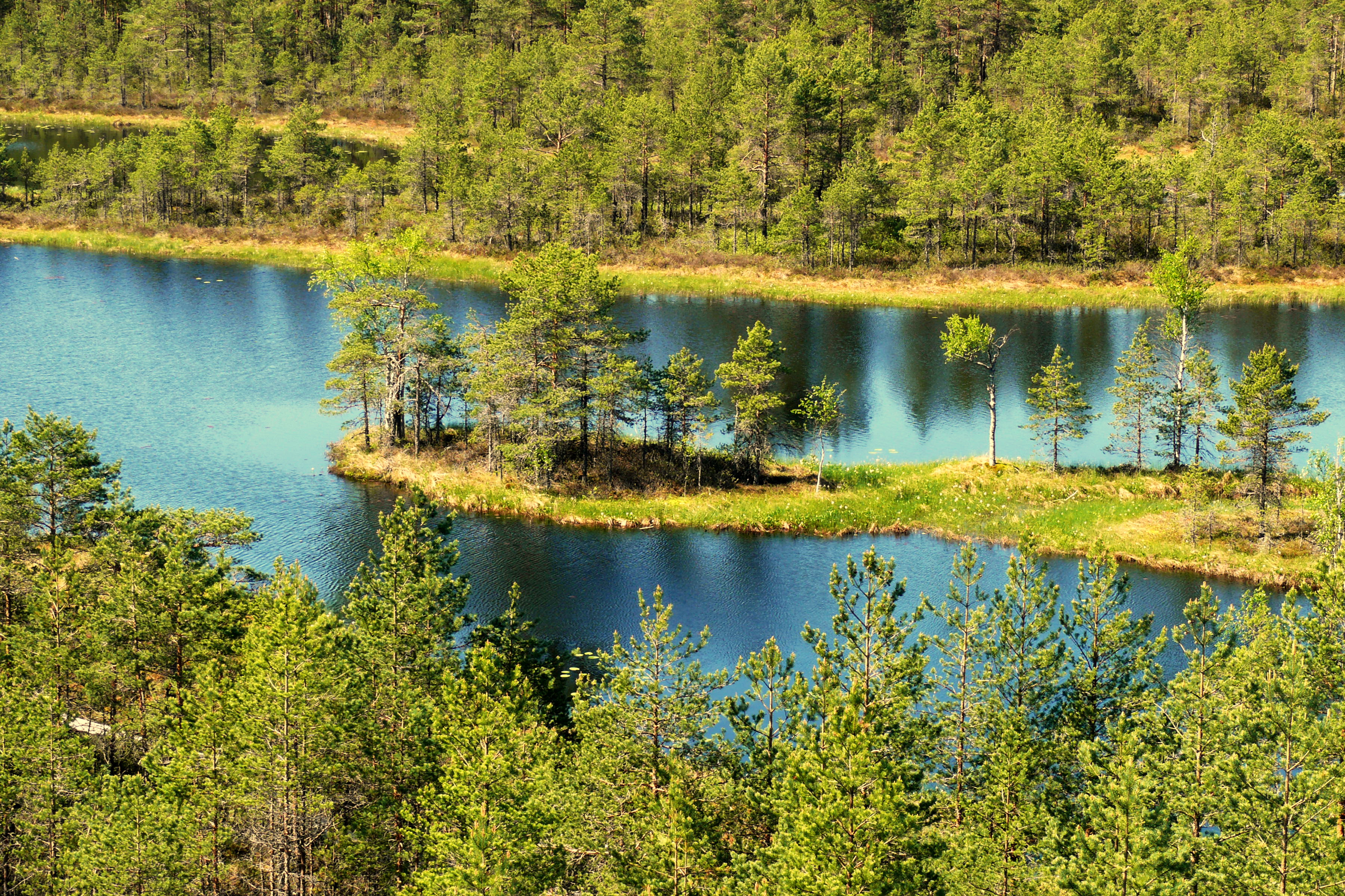 Mukri raba järvest ja seal olevast saarest tehtud pilt vaatetornist.